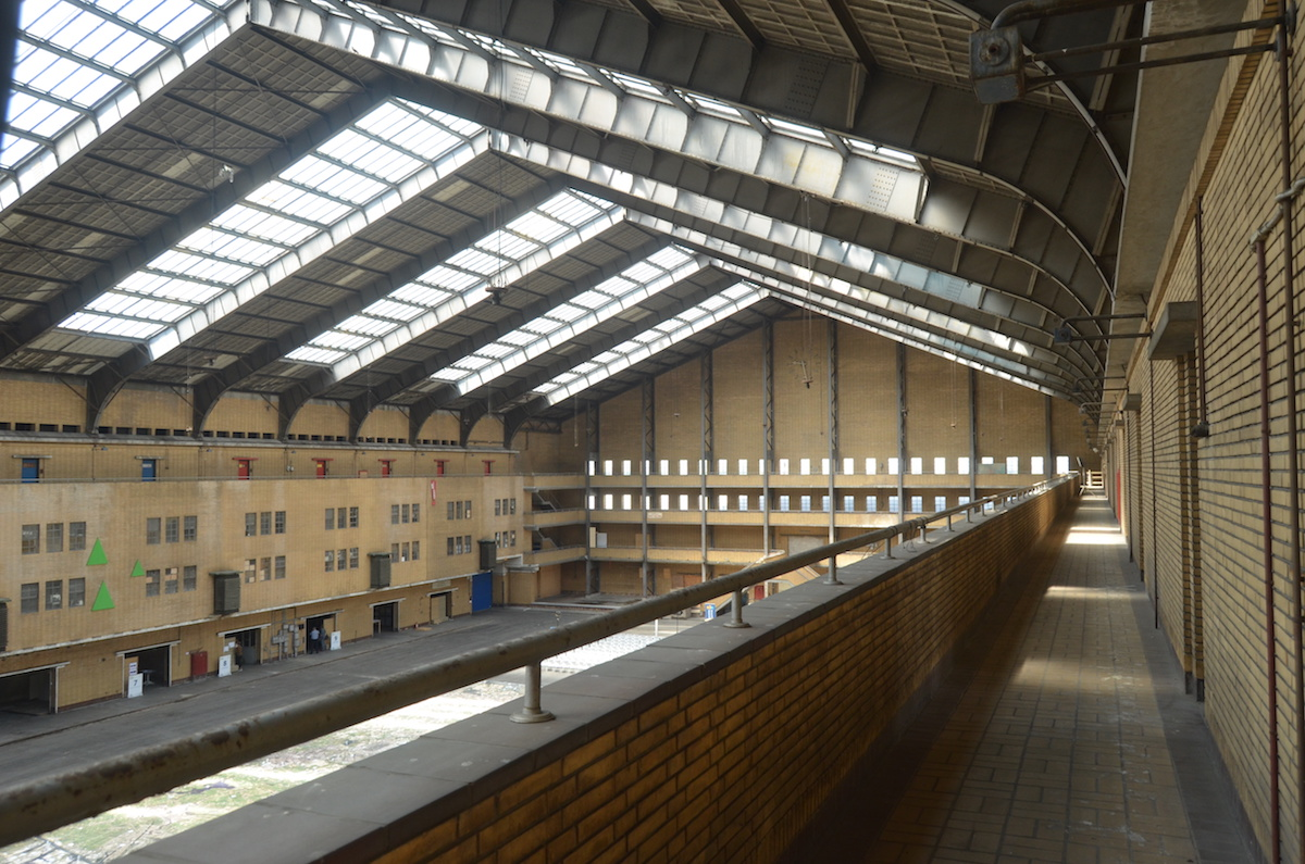 Centrale Markthal te Amsterdam-West - interieur (2); juni 2019. Foto: Erik Swierstra.